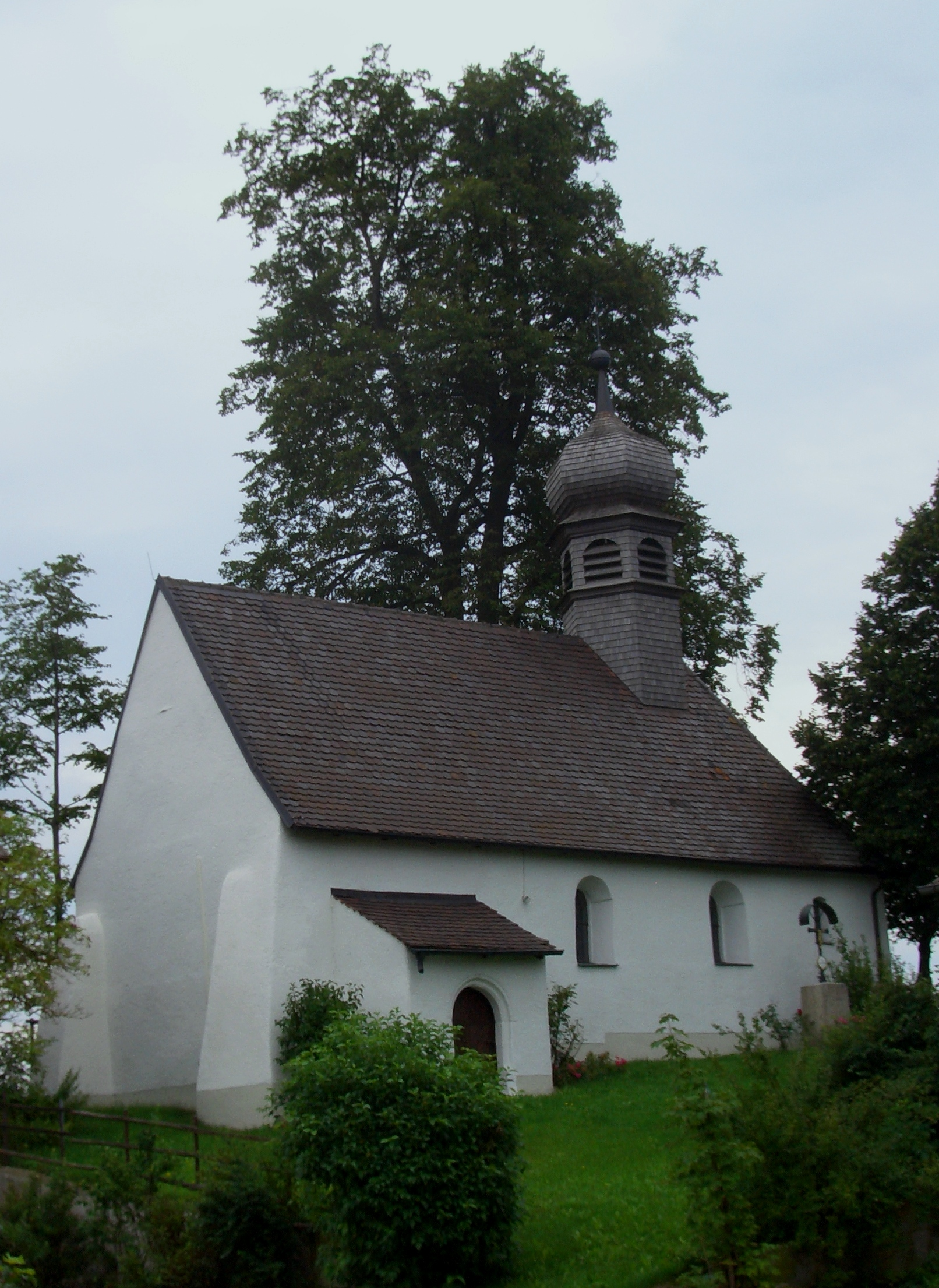 St. Bartholomäus in Kalsing (Ortsteil von Roding)